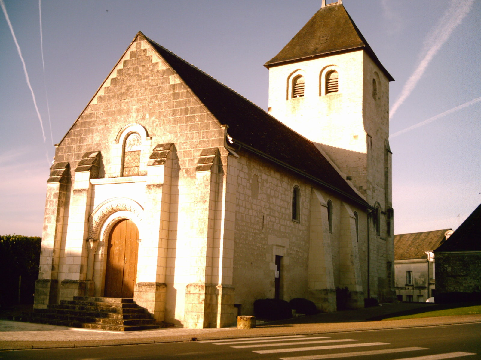 Eglise Saint Pierre ès-Liens du 12e à Vou